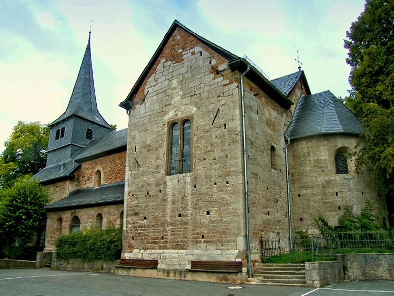 Twiste - Basilika St. Veith